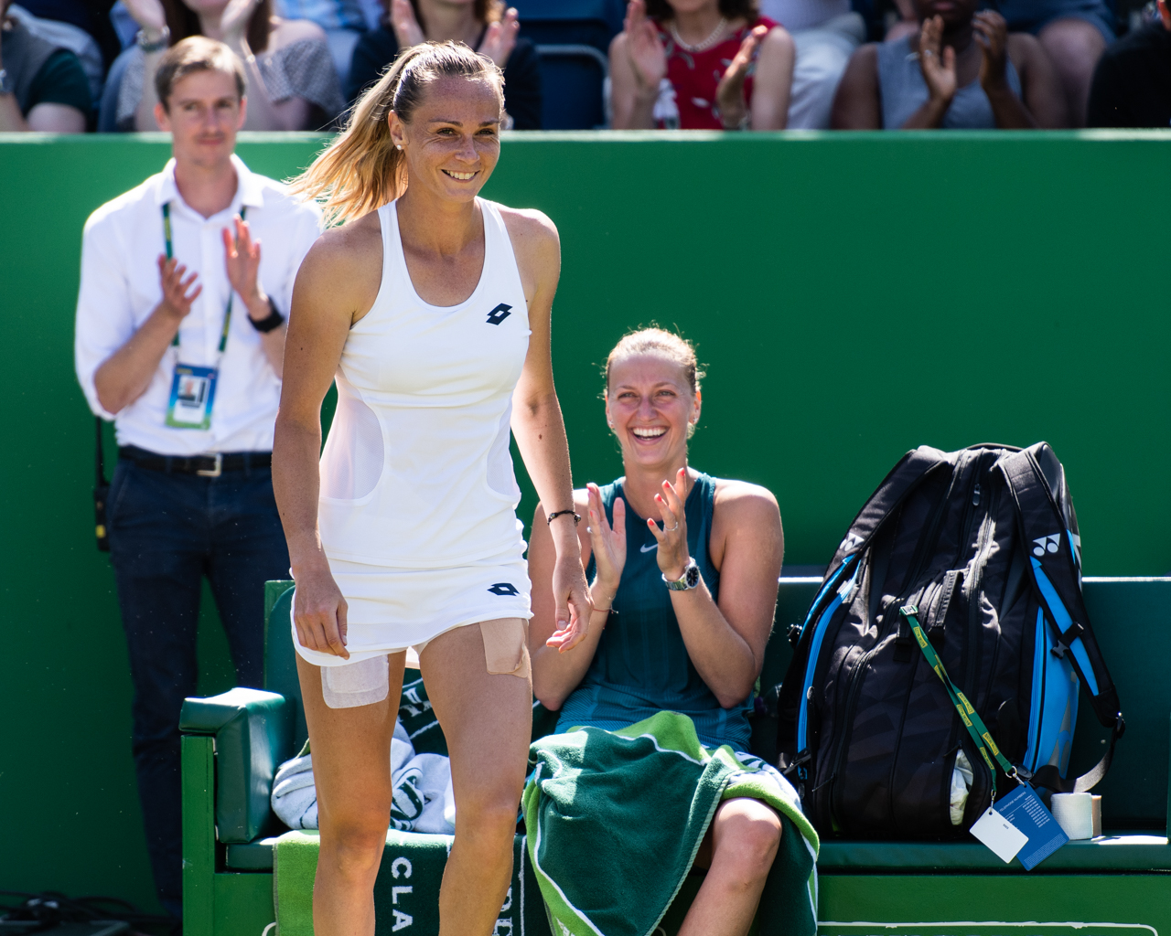 Petra Kvitova & Magda Rybarikova